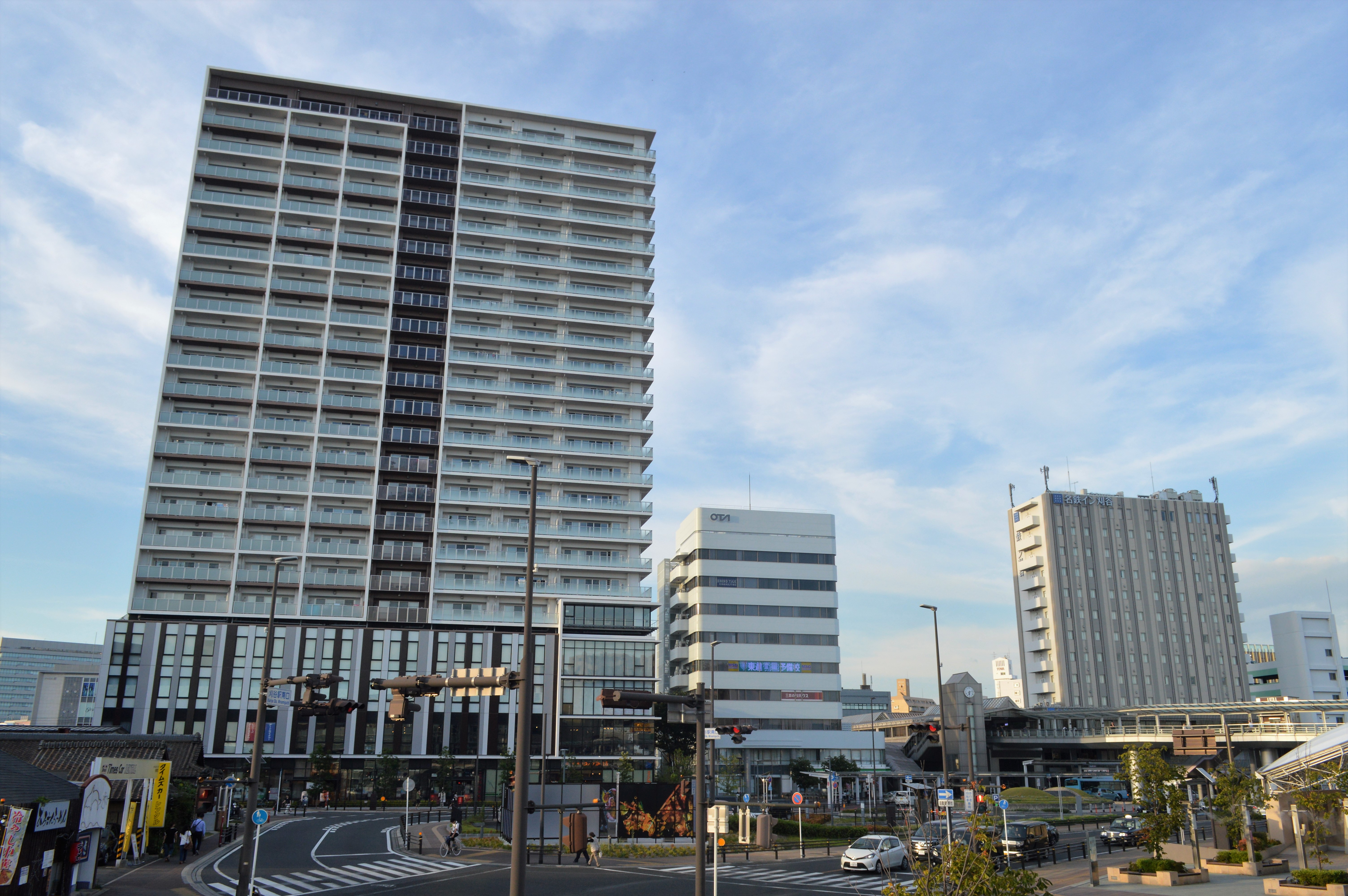 AKARIYA（アカリヤ）とJR東海道本線・名鉄三河線刈谷駅。愛知県刈谷市。